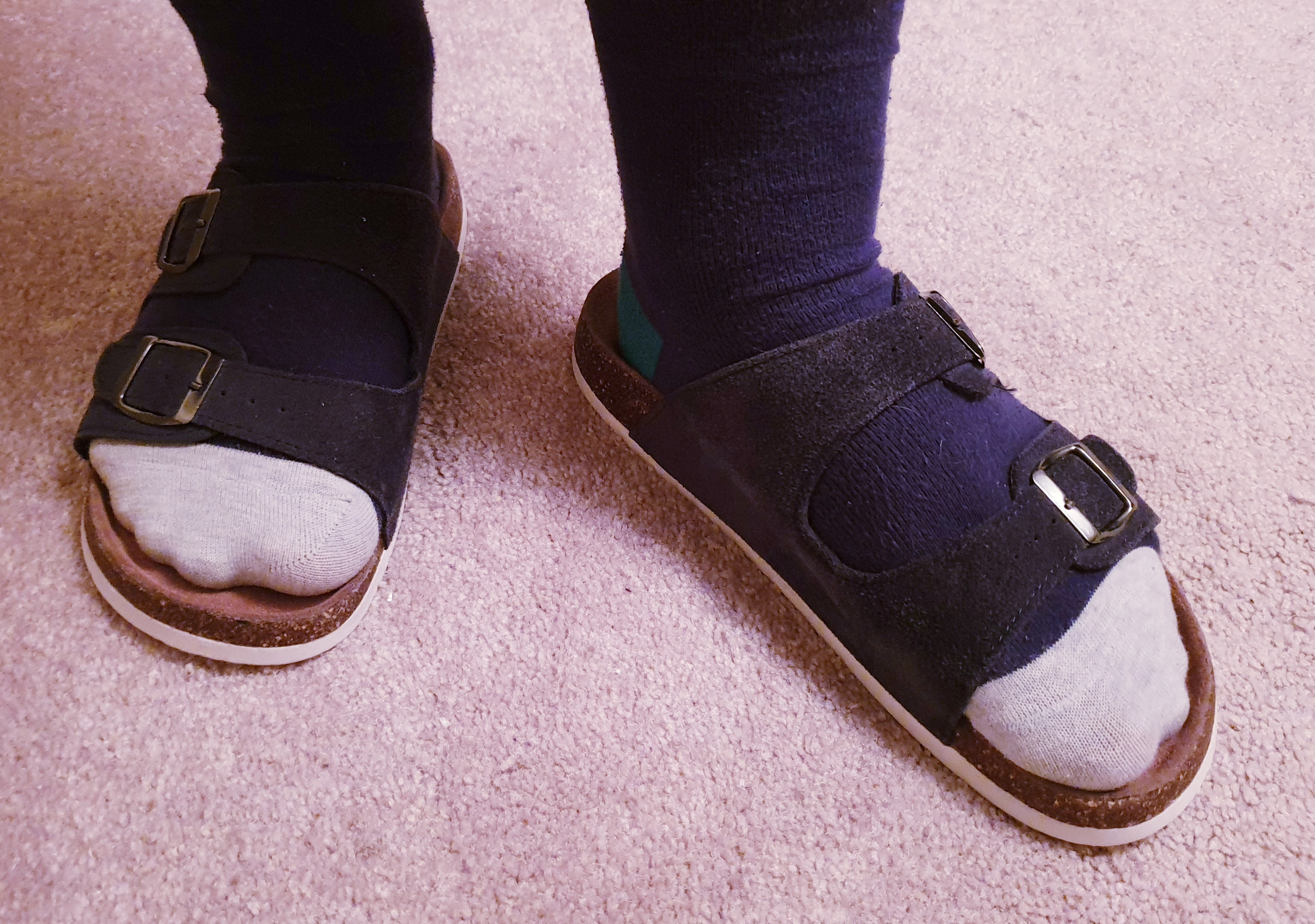 This type slippers, resembling birkenstocks are extremely popular in the Czech Republic and Slovakia. In Czech and Slovak they're often called "Pantofle", "Papuče", "Nazouváky" or "Bačkory".